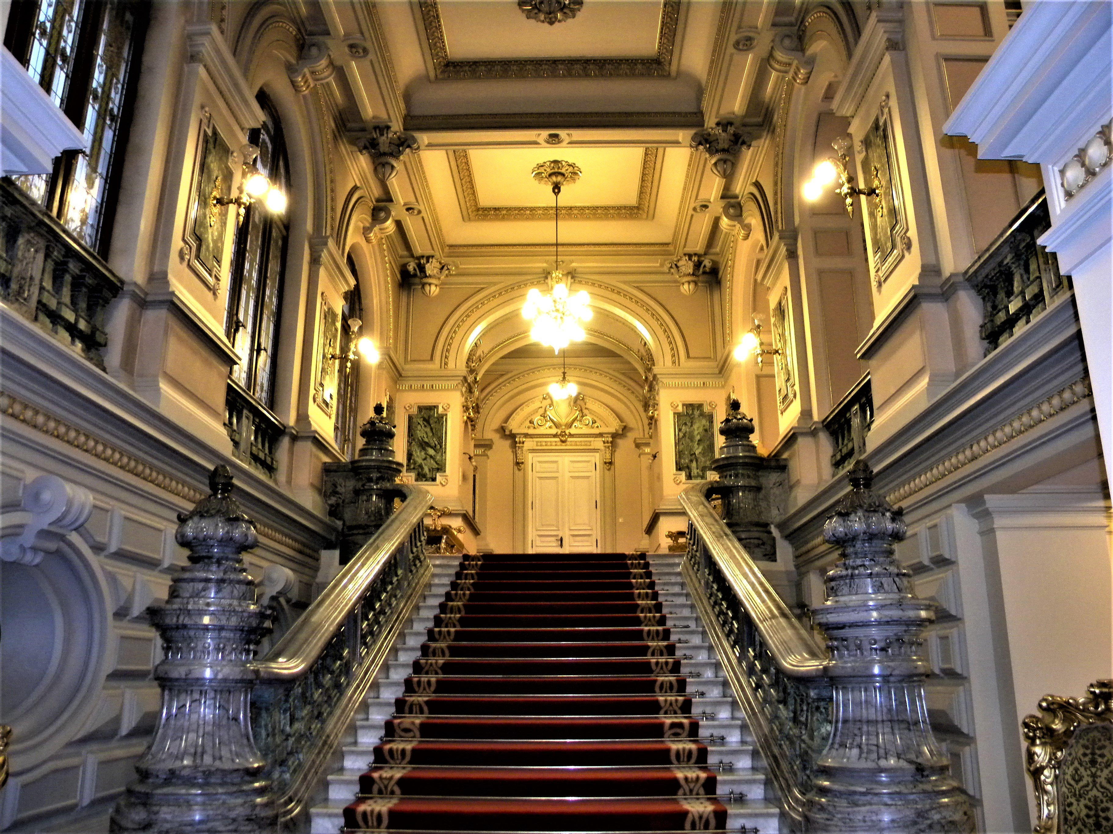 Bucuresti, Romania. MUZEUL NATIONAL COTROCENI. (Holul de la intrare); (B-II-a-A-19152)(5). Muzeul Național Cotroceni este un muzeu din București, România, situat în Palatul Cotroceni, unde pot fi vizitate spații din fosta mănăstire de la Cotroceni și fostul palat regal de la Cotroceni, unde au locuit regele Ferdinand și regina Maria, precum și colecțiile de artă veche decorativă europeană. Ansamblul Cotroceni a fost ridicat între 1679–1681, de către Domnitorul Șerban Cantacuzino (1678–1688). Sub aspect arhitectonic, ansamblul de la Cotroceni cunoaște câteva momente de referință: primul este legat de numele ctitorului Șerban Cantacuzino (1678–1688); al doilea datează din perioada domniei lui Barbu Dimitrie Știrbei (1849–1853, 1854–1856) care, în 1852, îl reface și modernizează şi înființează grӑdina de la Cotroceni (una dintre marile grădini ale Capitalei ); urmează edificarea palatului princiar (1893–1895), de către arhitectul francez Paul Gottereau.